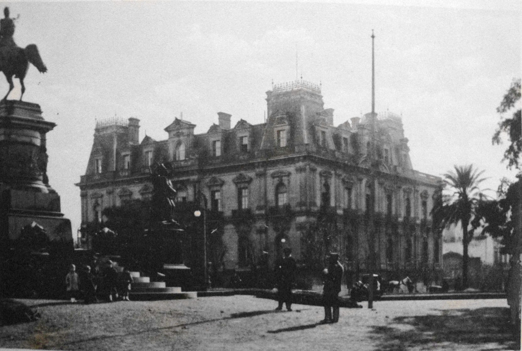 Vista de la residencia de Matilde Anchorena y Carlos Ortiz Basualdo, obra del arquitecto belga Jules Dormal en Juncal y Maipú, demolida en 1969. Buenos Aires, Argentina